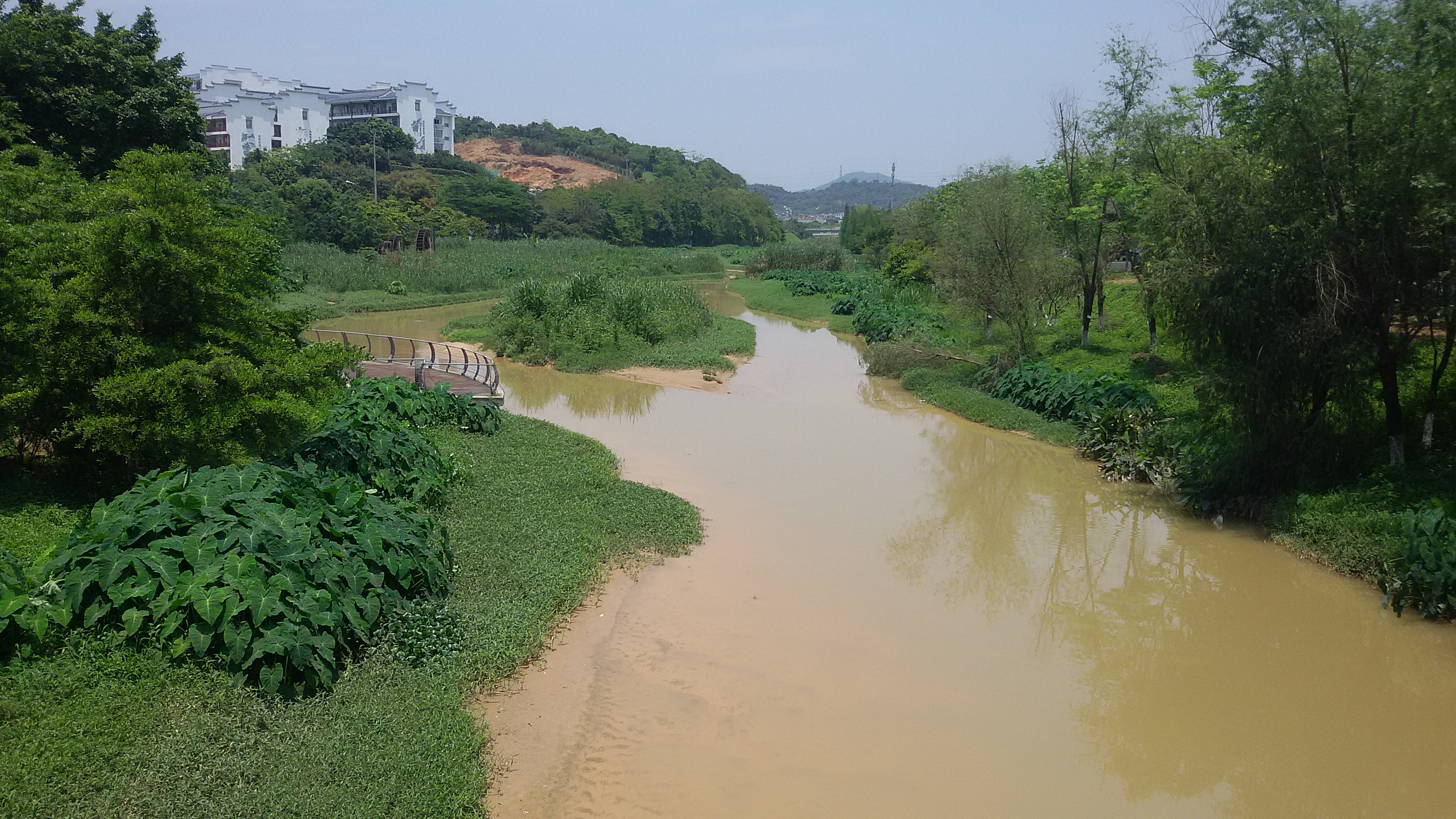 粵語: 南崗河（蘿崗段，近廣州科學城中學、蘿崗小學同玉喦中學嗰頭）